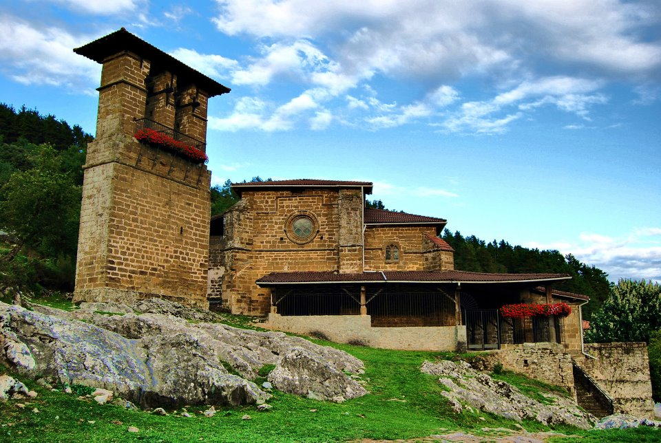 Santuario de Santa Maria del Yermo